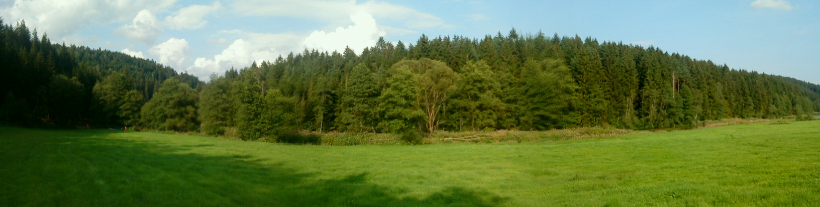 Der Wald hinter Sallitz